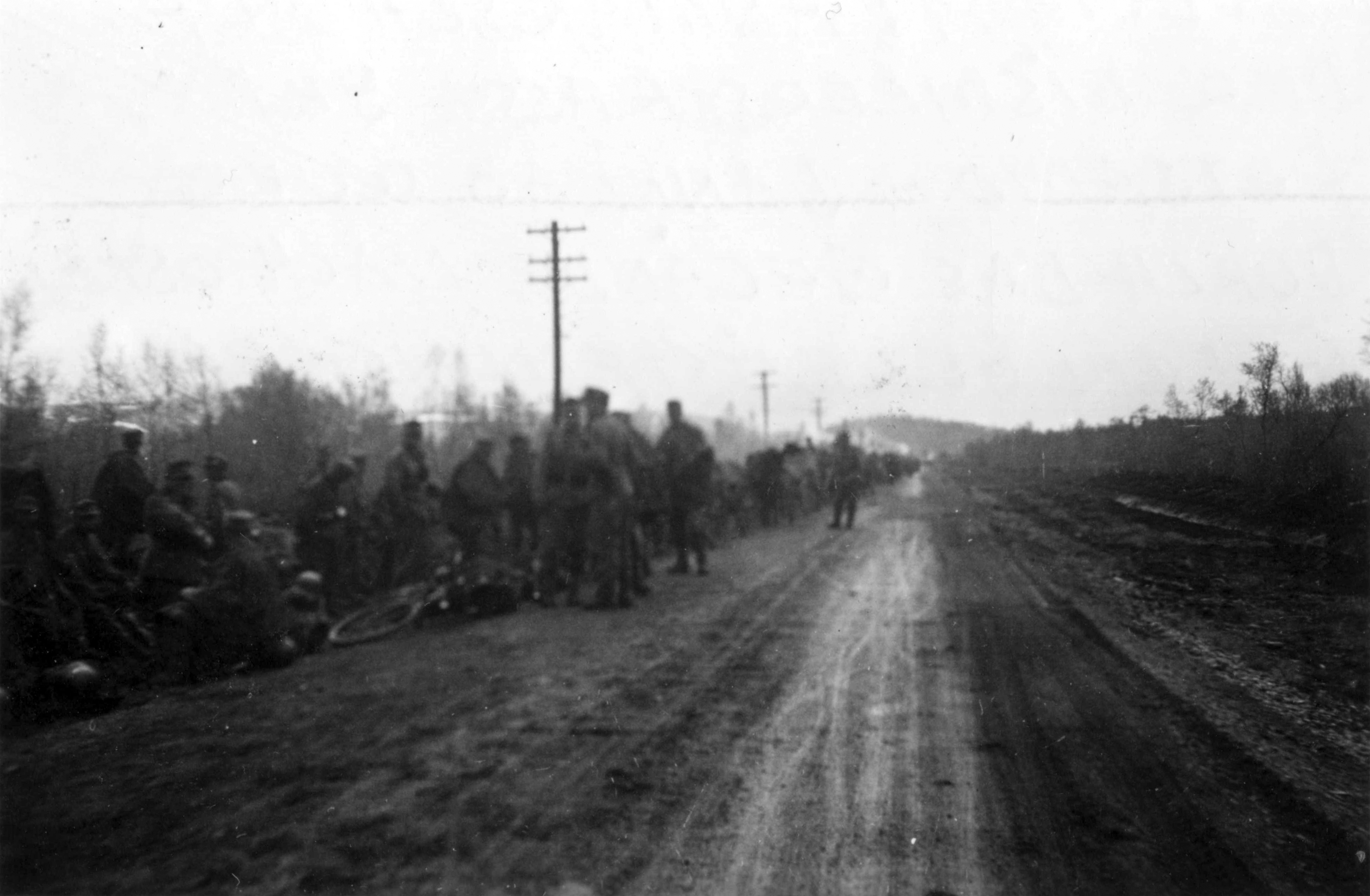 Marsjering på ishavsveien ved Petsamo Tittel / Title: Marsjering på ishavsveien ved Petsamo Dato / Date: 26.06 1941 Fotograf / Photographer: Ukjent/Unknown Utgiver / Publisher: Sted / Place: Finland Eier / Owner Institution: Arkiv i Nordland Lenke / Link: Arkiv i Nordland Arkivreferanse /Archive reference: AIN.NA143.0262 Fra Dag Skogheims Privatarkiv Tekst bak bildet: 26.06.1941: Anmarsch auf der eismeerstrasse bet Petsamo - dann ab Quer durch das gelände nach - osten in den bereitstellungsraum vor der russengrenze. Trafen finnische grenzjäger. 26.06.1941: Marsjering på ishavsveien ved Petsamo- for så å vandre gjennom landskapet mot øst i utplasseringsområdet ved den russiske grensen. Møtte finske grensejegere.